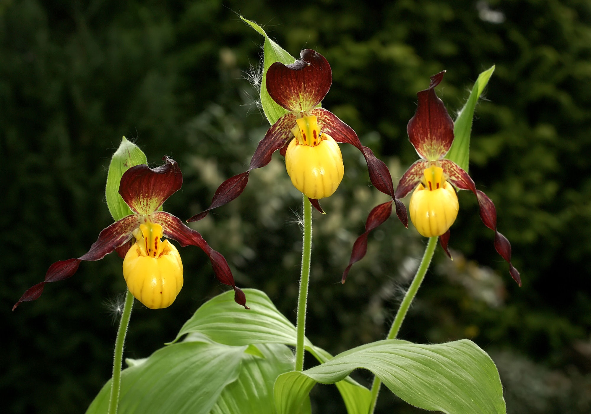 Cypripedium parviflorum